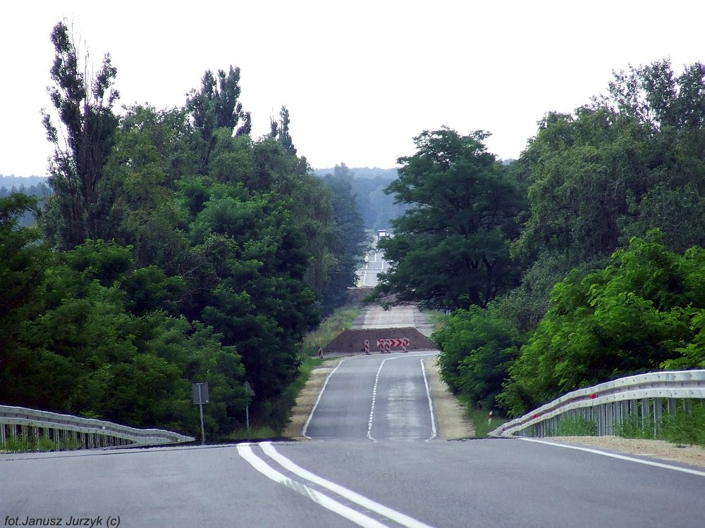 Droga krajowa nr 50 w Stojadłach.